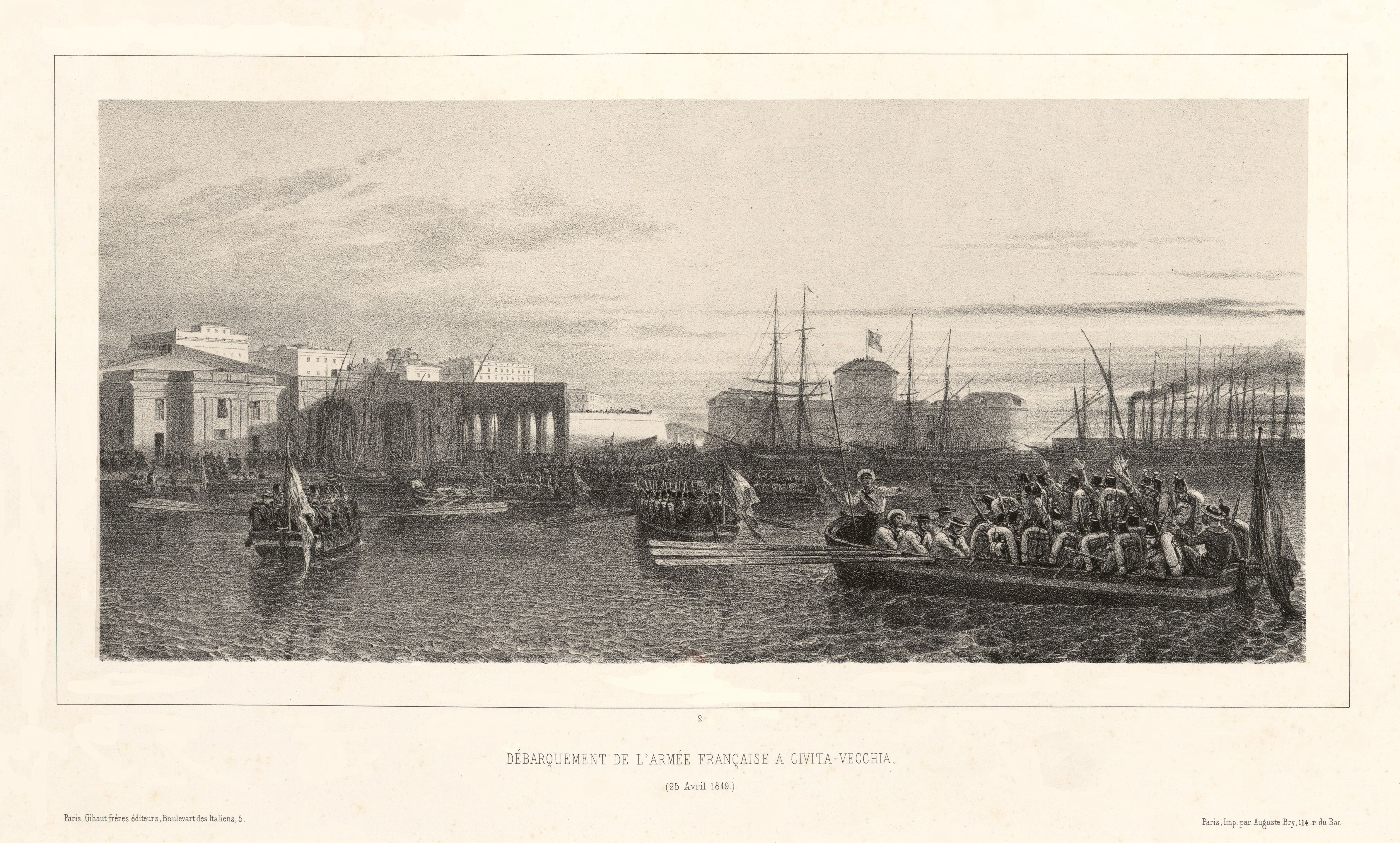 Débarquement de l'armée française à Civita-Vecchia, 25 avril 1849. Lithographie d'Auguste Raffet, Souvenirs d'Italie. Expédition de Rome, Paris, Gilhaut, 1854.